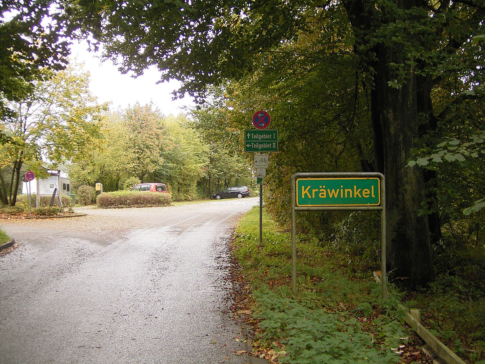 Radevormwald